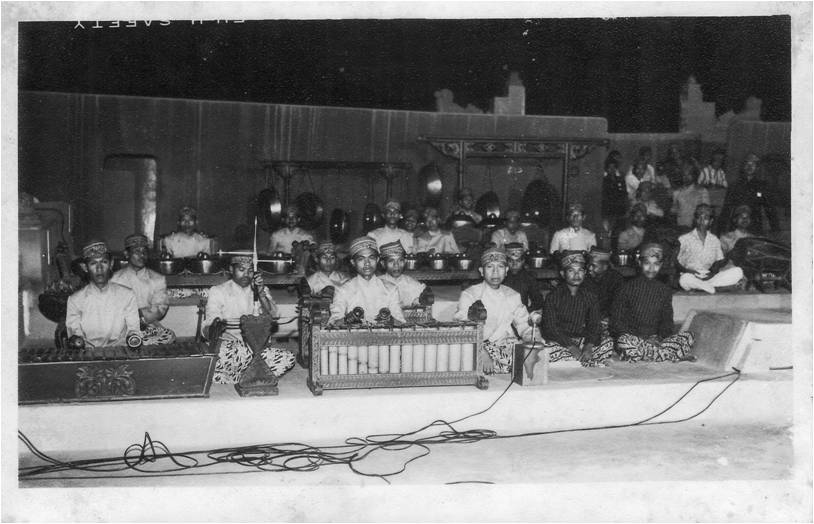 Pementasan pertama Sendratari Ramayana di panggung terbuka Roro Jonggrang, Prambanan (1961).